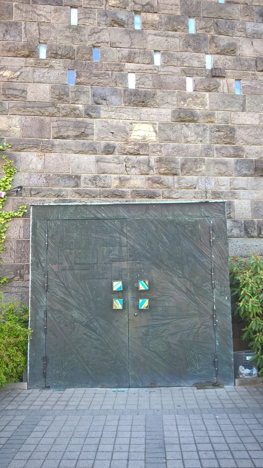 Petruskirche, Gießen, Hessen, Deutschland